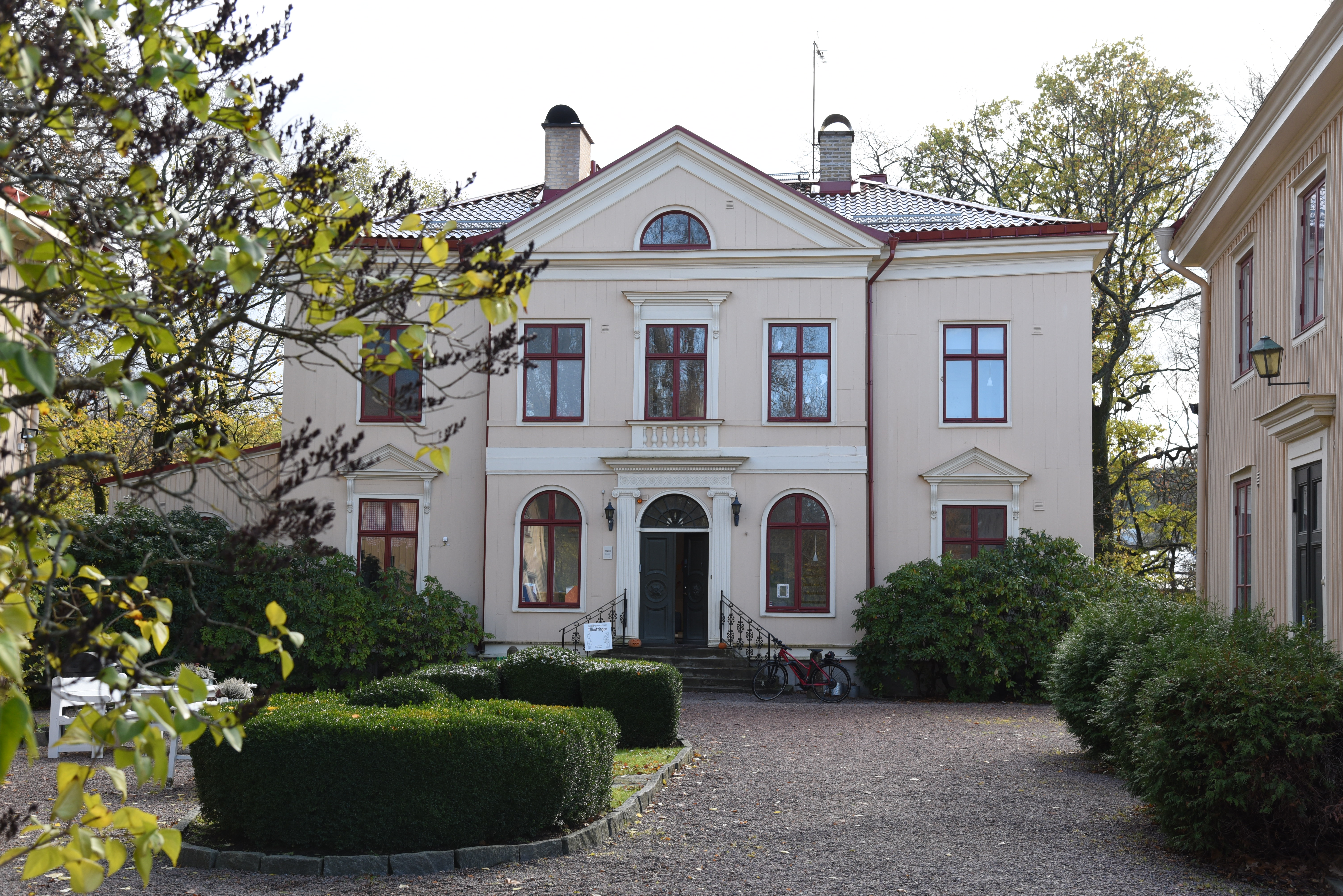 Kvibergsnäs landeri i stadsdelen Kviberg i Göteborg. Huvudbyggnaden.